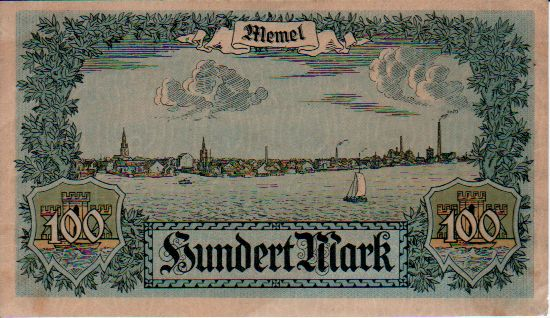 Memelland 100 mark 1922